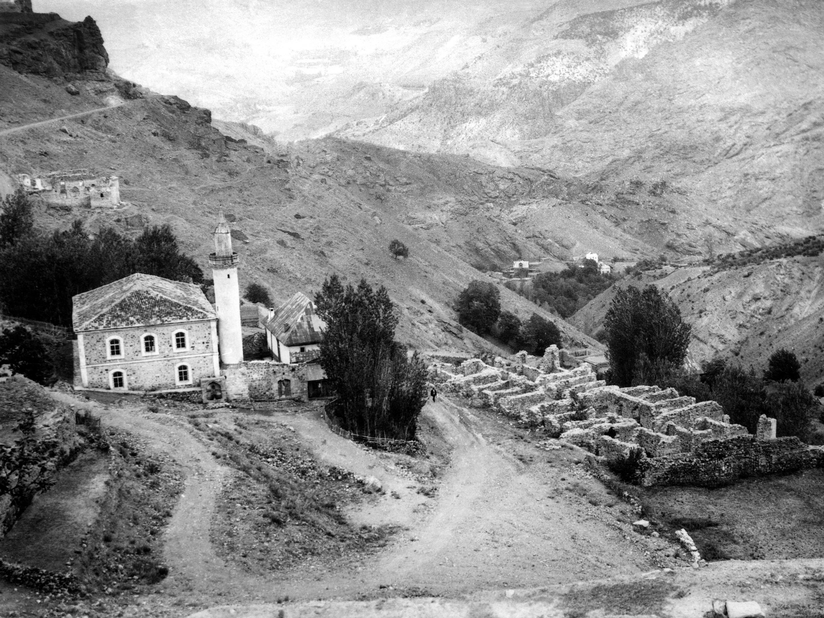 Eski Süleymaniye Mahallesi